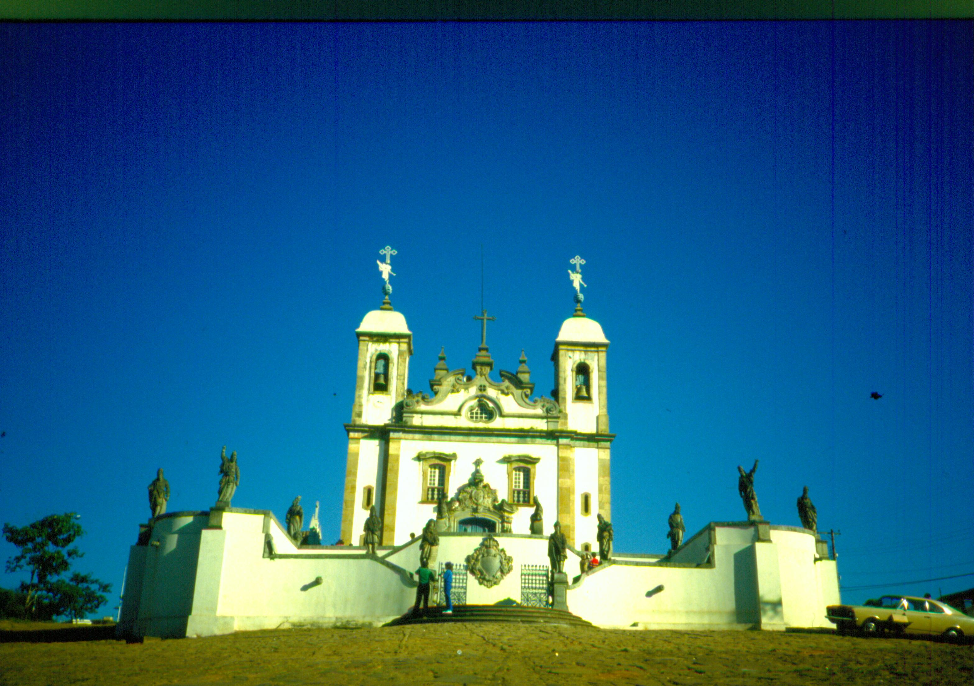 Congonhas, Minas Gerais, Brazil